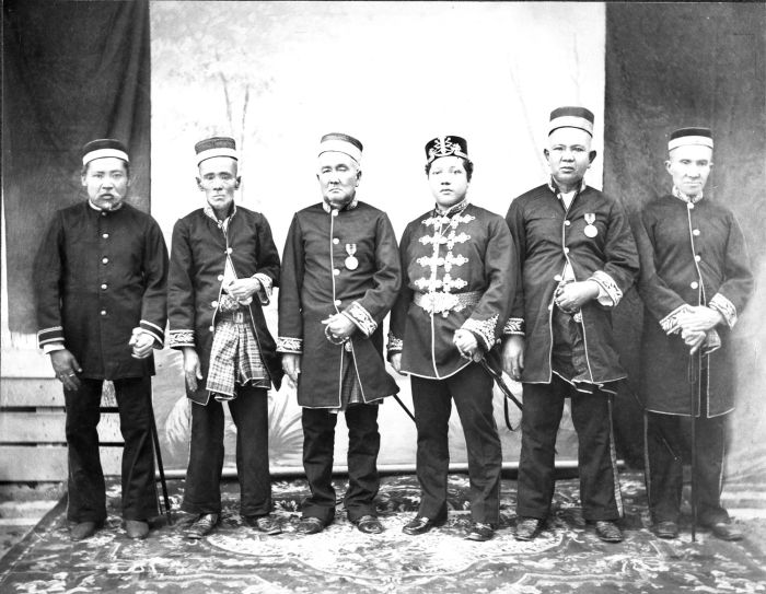 Foto. De Sultan van Siak met rijksgroten in de afdeling Bengalis, oostkust van Sumatra